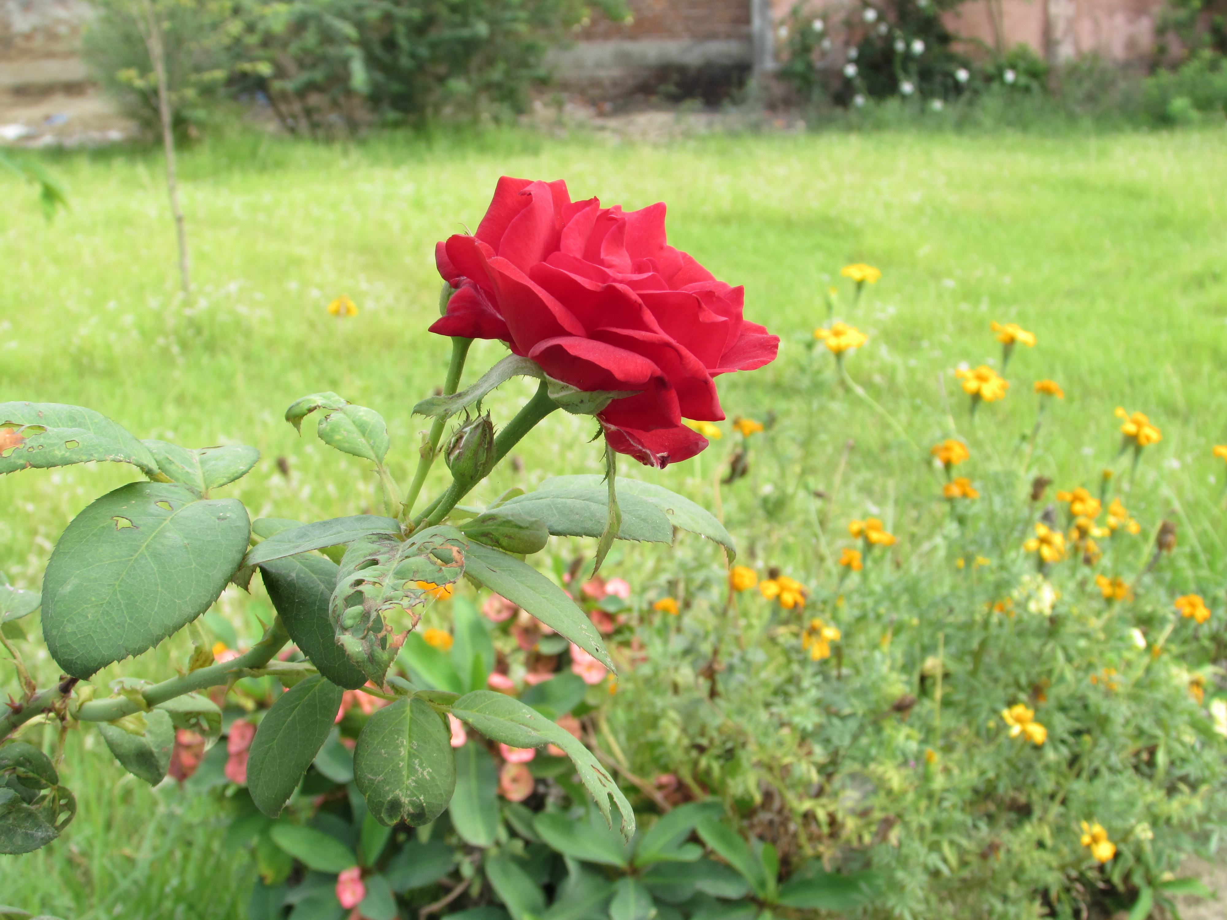 Rosa 'Baccará' and its leaflets..